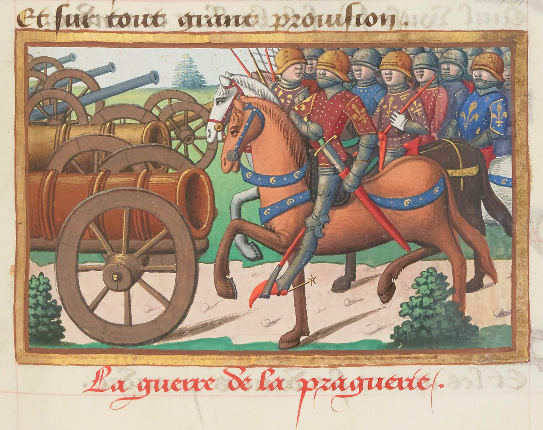 Enluminure représentant la Praguerie de 1440 dans Les Vigiles de Charles VII, manuscrit de Martial d'Auvergne, vers 1484, BnF, Manuscrit Français 5054, folio 101 recto.